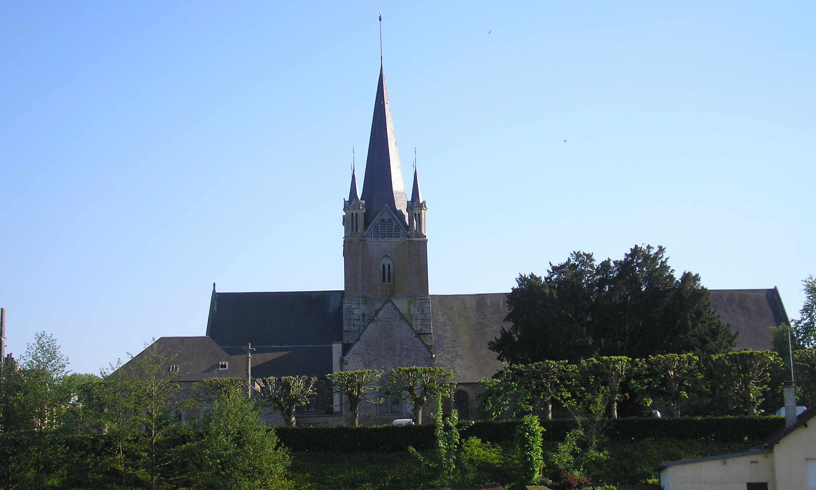 Vassy (Normandie, France). L'église Saint-Martin-Notre-Dame-et-Saint-André, côté nord.